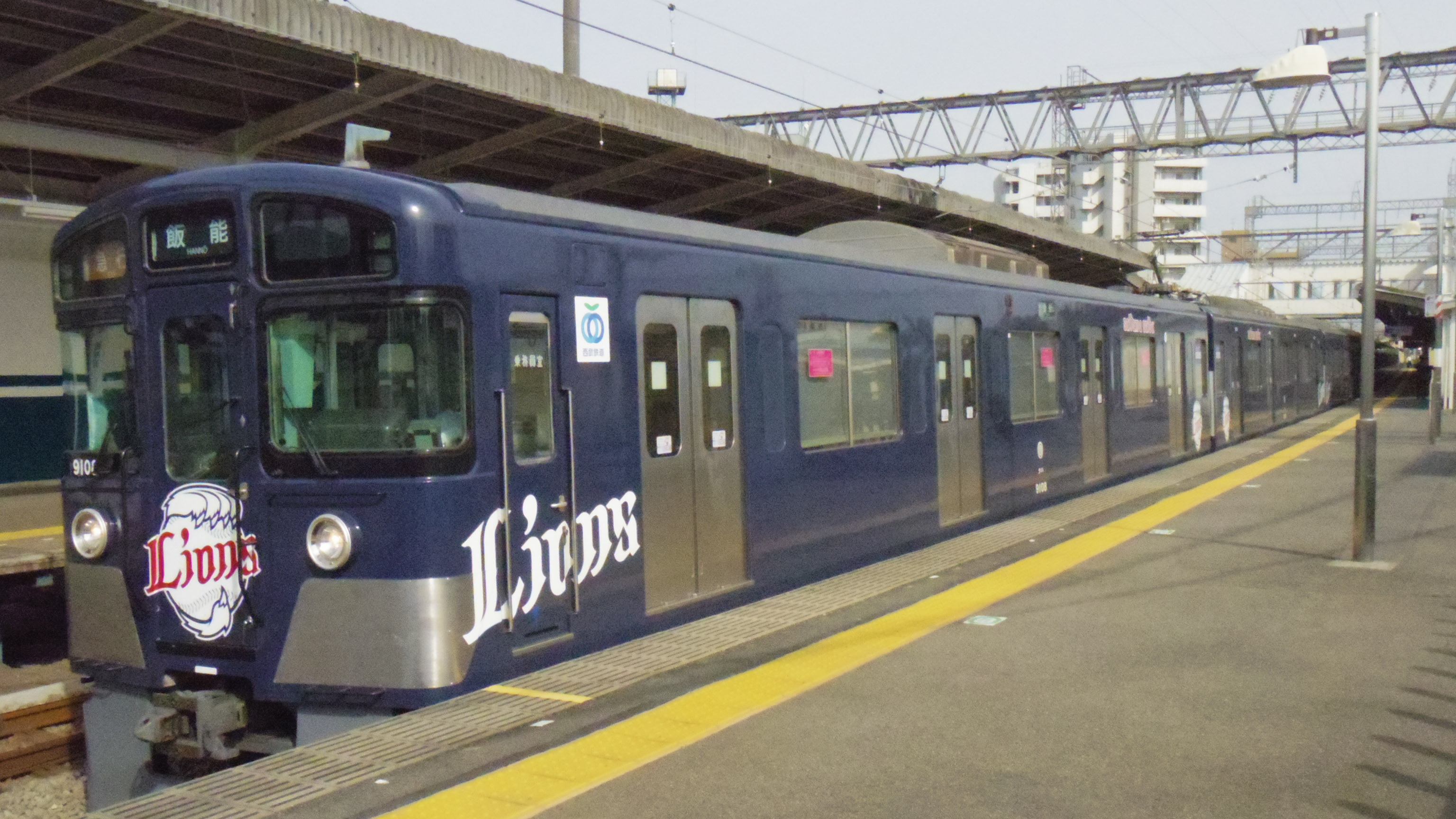 埼玉西武ライオンズのラッピング列車（西所沢駅ホームにて撮影）